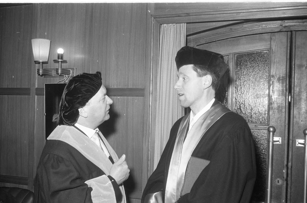 unter den Leitthema "Informationsbegriffe der Umgangssprache und der Wissenschaft" in der Mensa. Im Bild u.a. Zoologe Prof. Dr. Bernhard Hassenstein von der Universität Freiburg (rechts) im Gespräch mit dem Direktor des Instituts für Angewandte Physik Prof. Dr. Werner Kroebel (links).